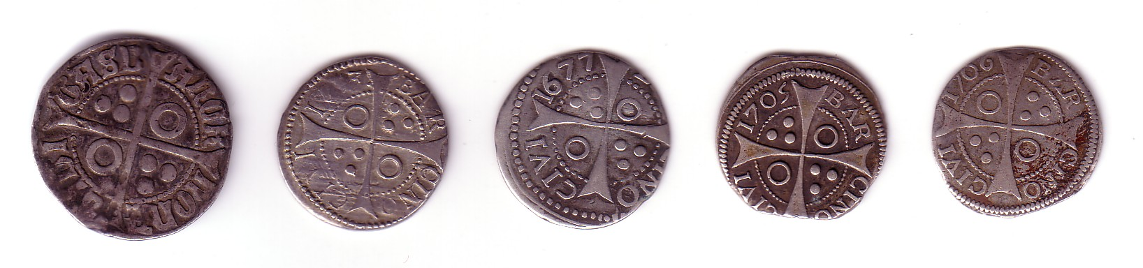 Croat (moneda catalana) anversos. El croat era una moneda catalana d'argent creada el 1285 pel rei Pere II. Se la va conèixer com a croat barceloní i, també, com a xamberg. A l'anvers figurava l'efígie del comte de Barcelona, i al revers la creu a la qual devien el nom.